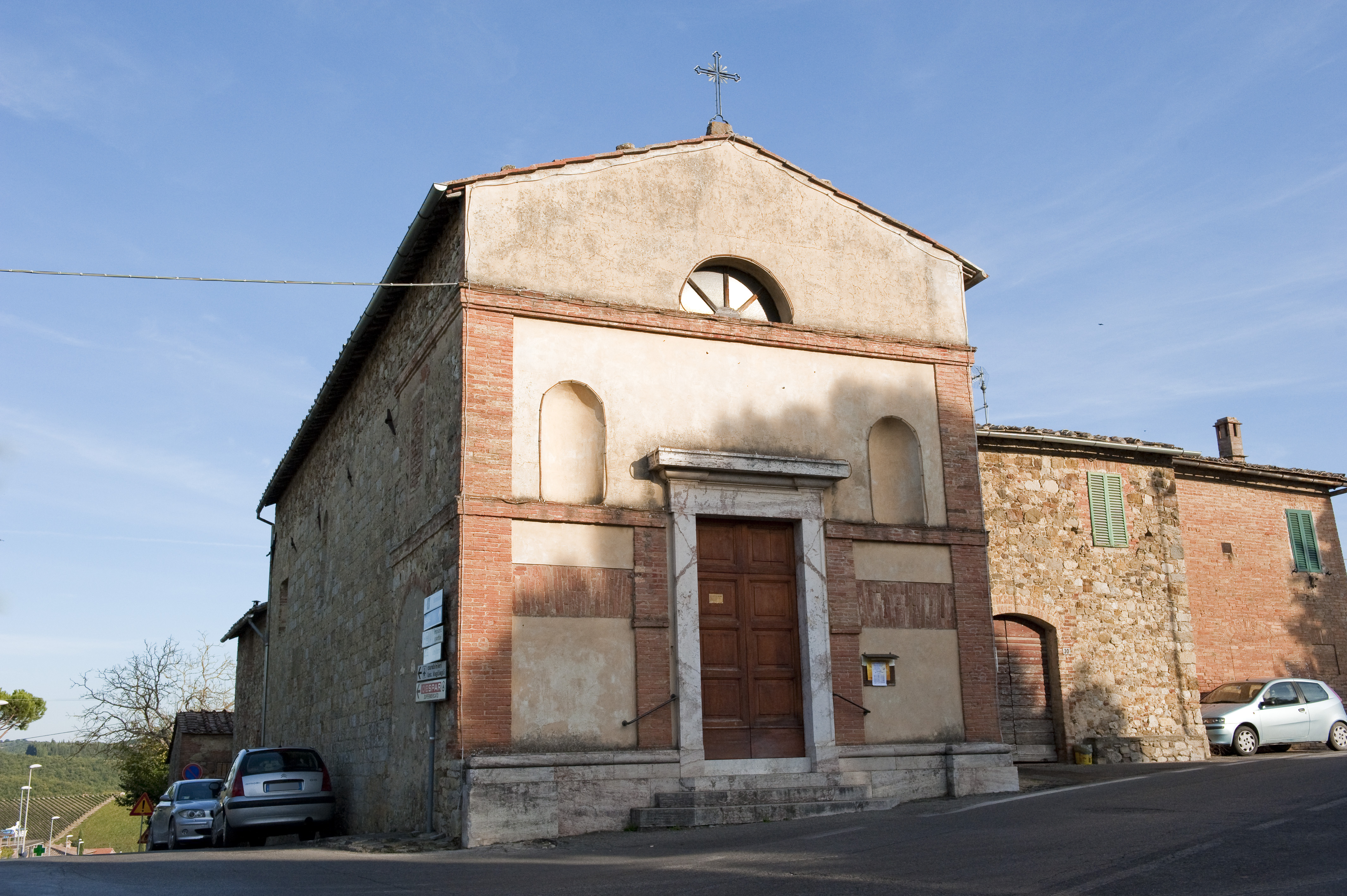 Chiesa di san Niccolò a Quercegrossa (Castelnuovo Berardenga)